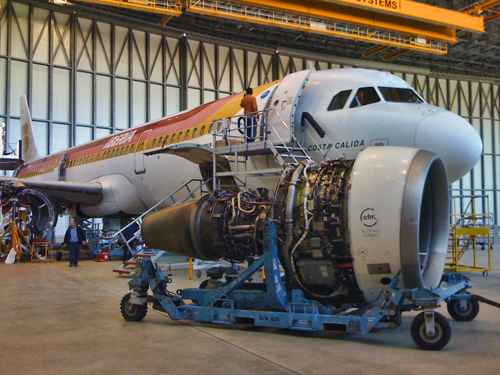 Engine change